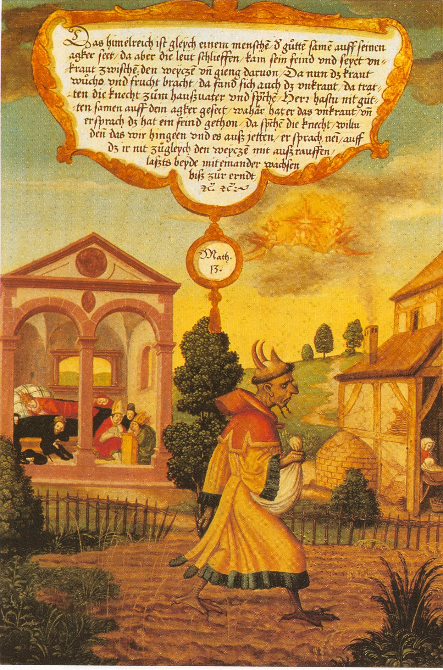 Mömpelgarder Altar: Das Gleichnis vom bösen Feind